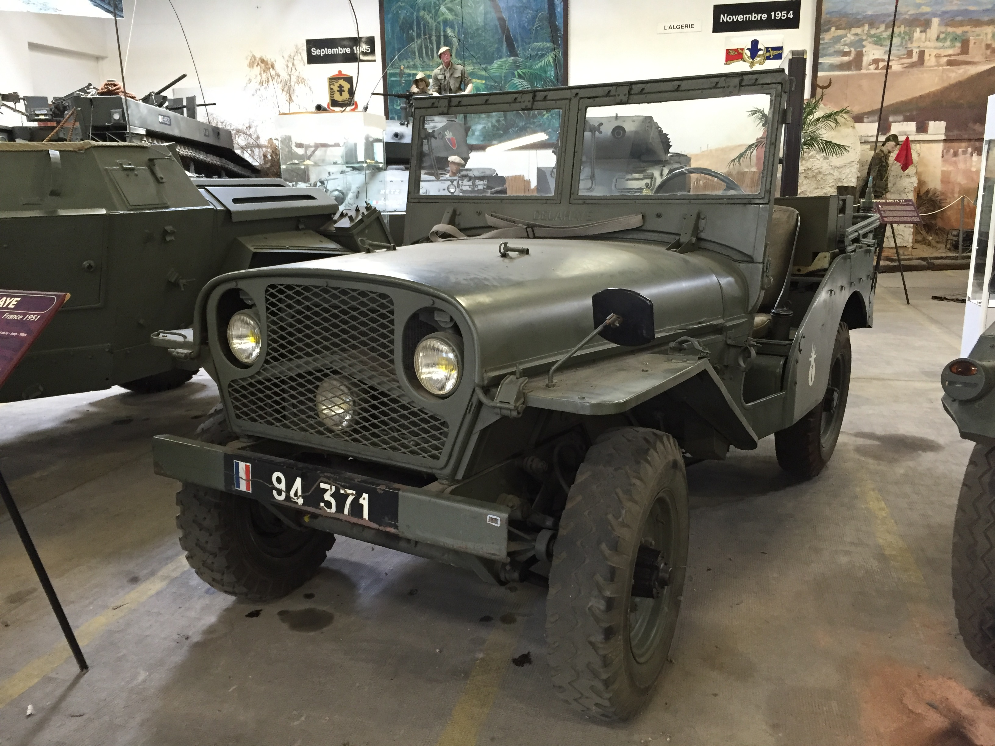 Delahaye VLR von links vorne